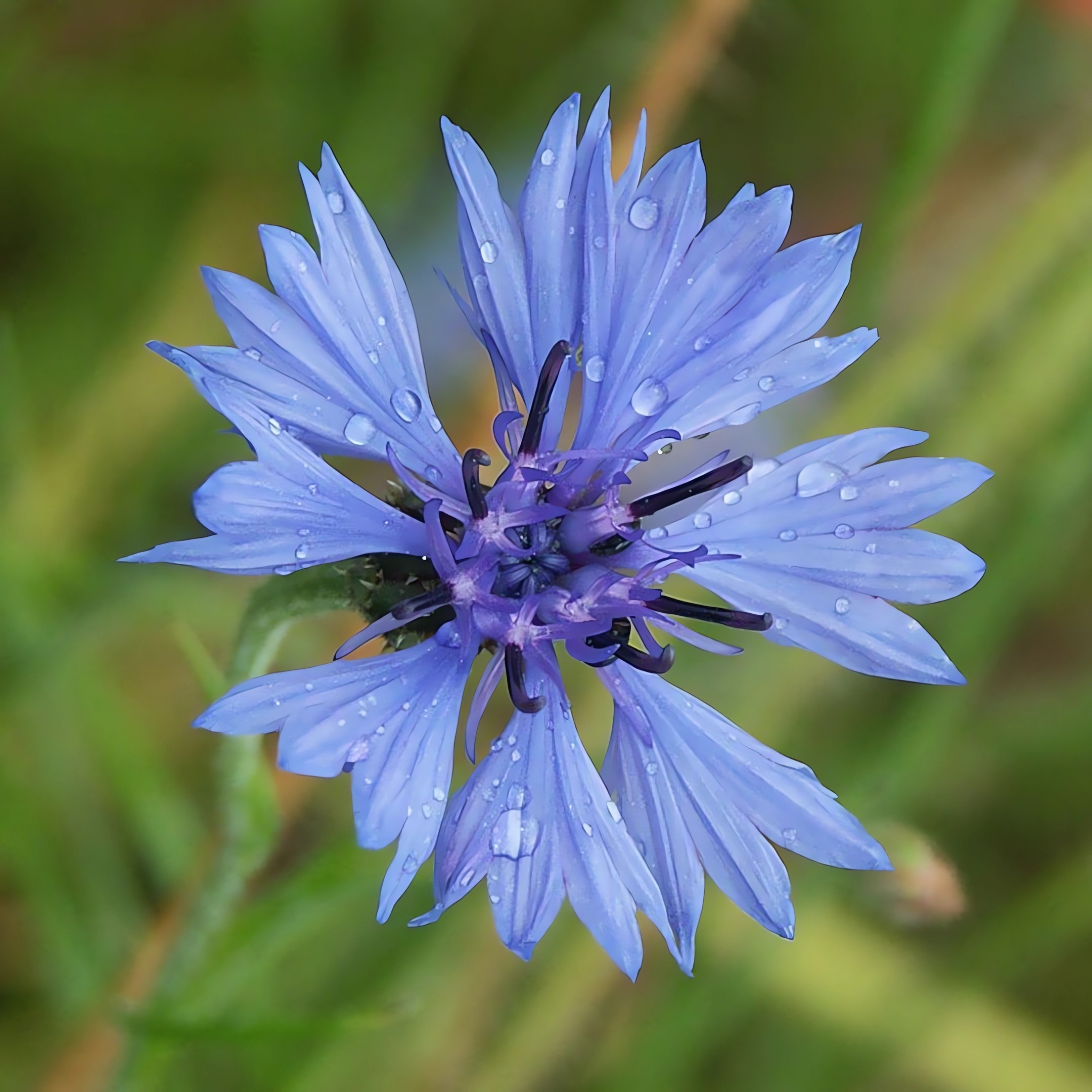 Blüte der Kornblume mit Regentropfen